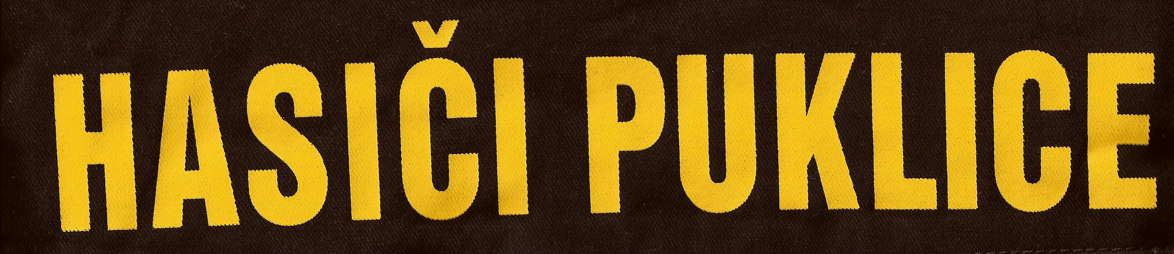 naskenované z bundy hasičů Puklice, není to logo